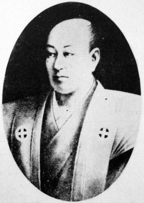 a Japanese man 島津斉彬 (Nariakira Shimazu)